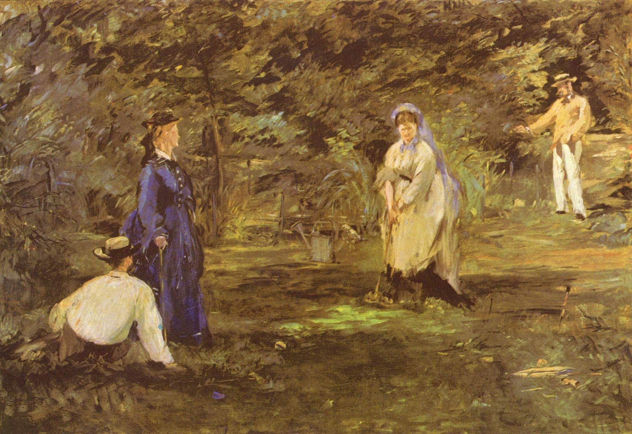 Vier Personen haben sich zum Krocketspiel versammelt: im Vordergrund sitzend der Künstlerkollege Alfred Stevens, im Hintergrund Paul Roudier, ein Freund Manets. Dazwischen sind Alice Lecouvé und Victorine Meurent zu sehen, die den Impressionisten Modell standen. Selten kam Manet der impressionistischen Malweise so nahe wie hier. Die Provokation war geplant: Die vermeintlichen Ehepaare sind die Künstler und ihre Modelle – die bürgerliche Idylle erweist sich als Trugbild.